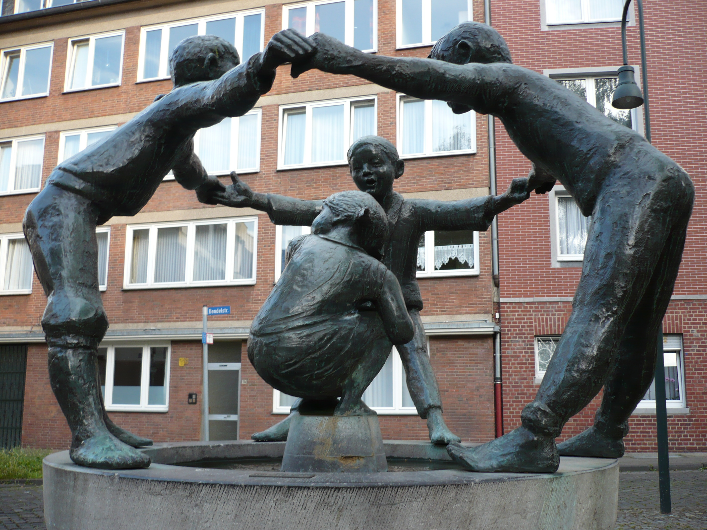 Türelüre-Lißje in Aachen